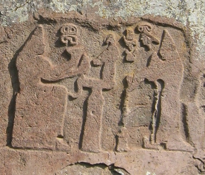 Firaktin, Hethitisches Relief bei Kayseri, Türkei